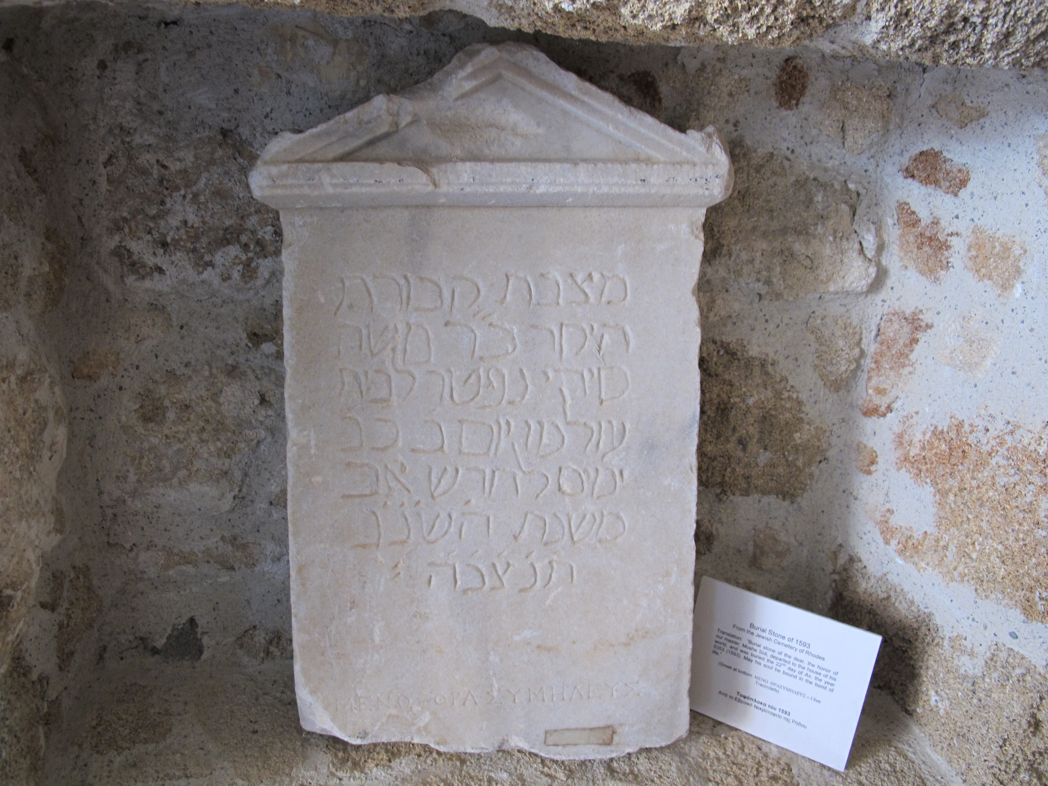 Rosi, Kahal Shalom Synagogue, museo, pietra tombale del 1593